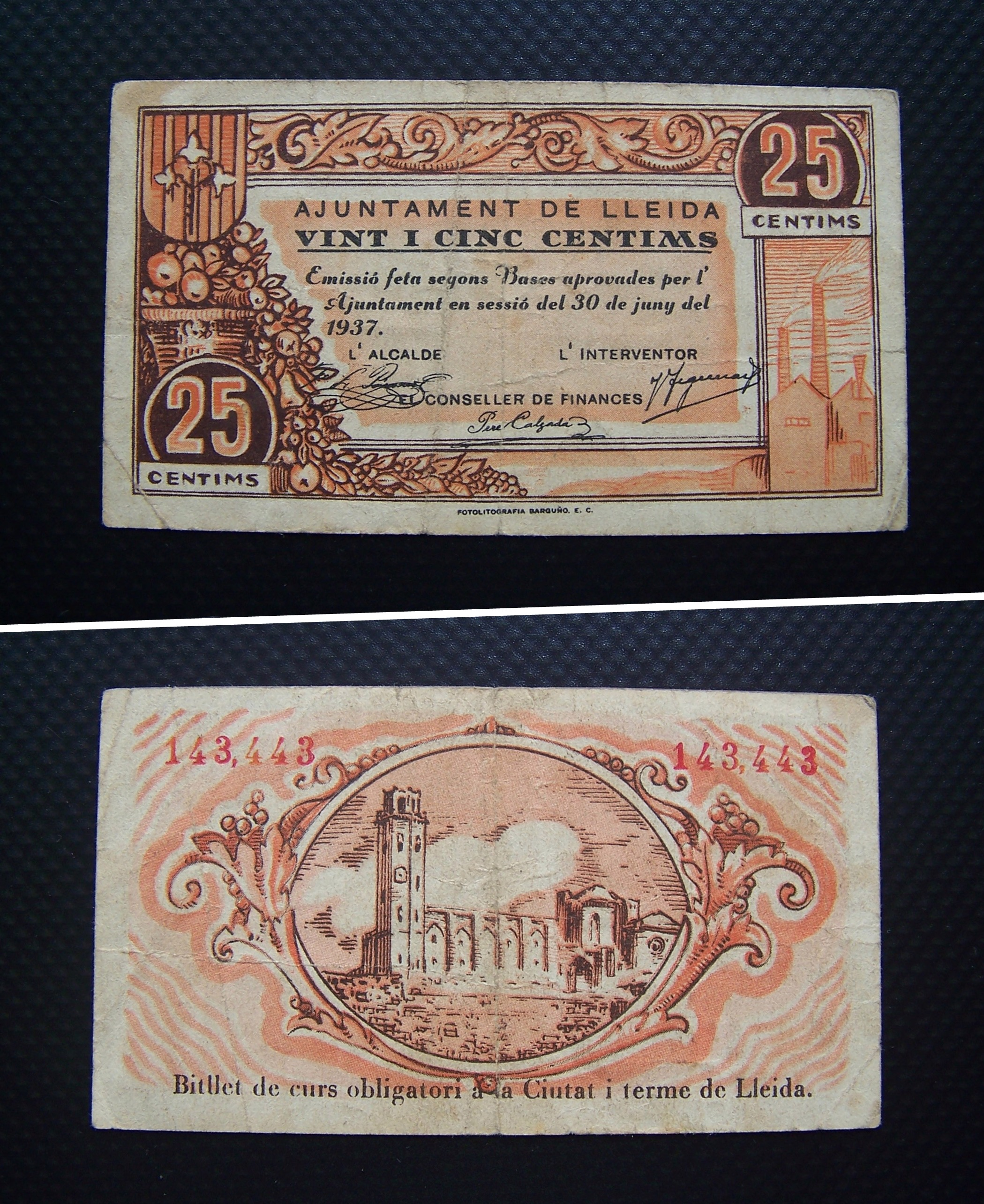 Billete local de la Segunda República Española, 25 céntimos, Lleida, 30 de junio de 1937